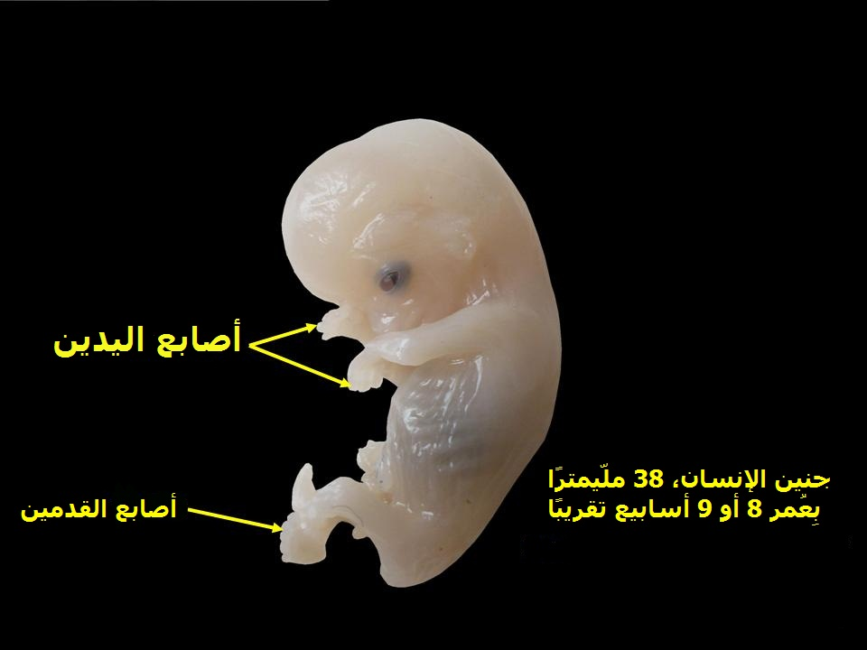 جنين الإنسان بِعُمر 8 إلى 9 أسابيع، وبِطول 38 ملّيمتر.